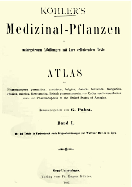 Köhler’s Medizinal-Pflanzen, Gera-Untermhaus, 1887, Drucktitel Band 1